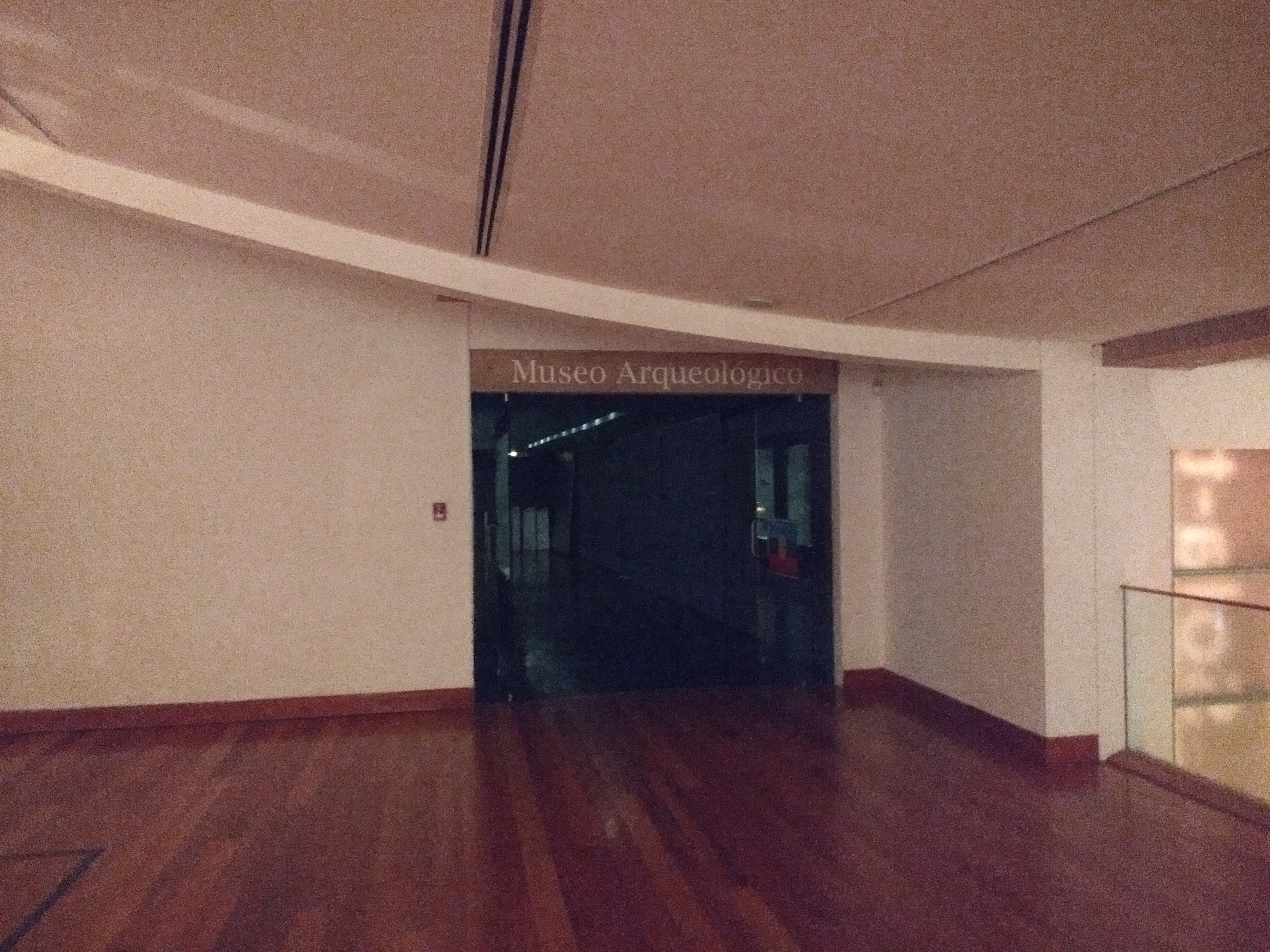 Entrada del Museo Arqueológico de Santiago, dentro del Museo de Artes Visuales.